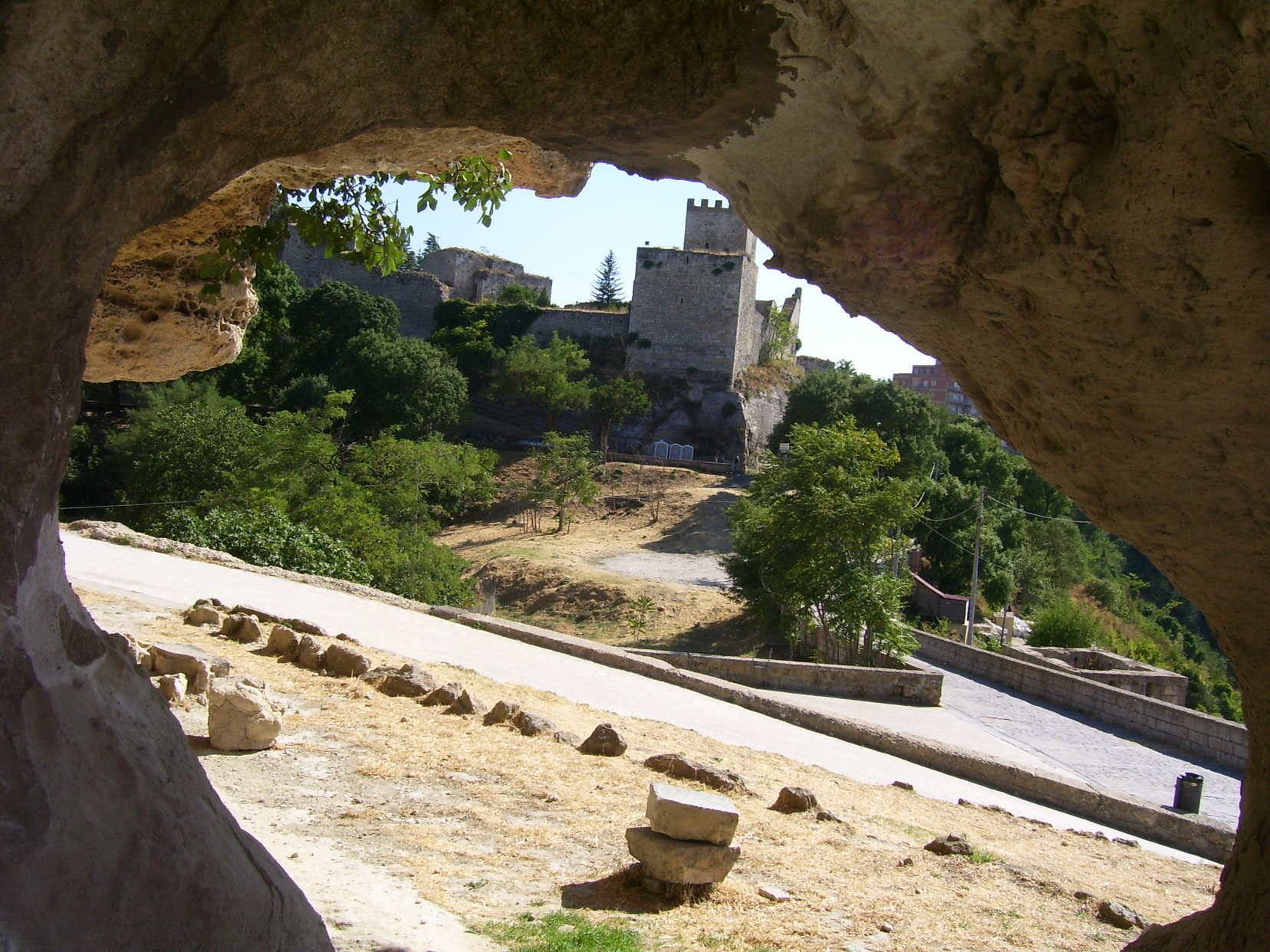 Il Castello di Enna visto dalla rocca di Cerere